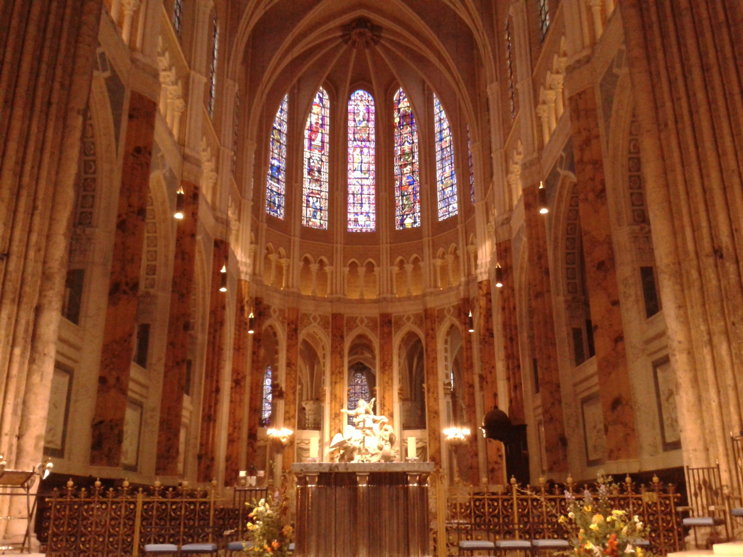 Photographie de l'état du choeur de Notre-Dame de Chartres, après les restaurations de 2008-2012.